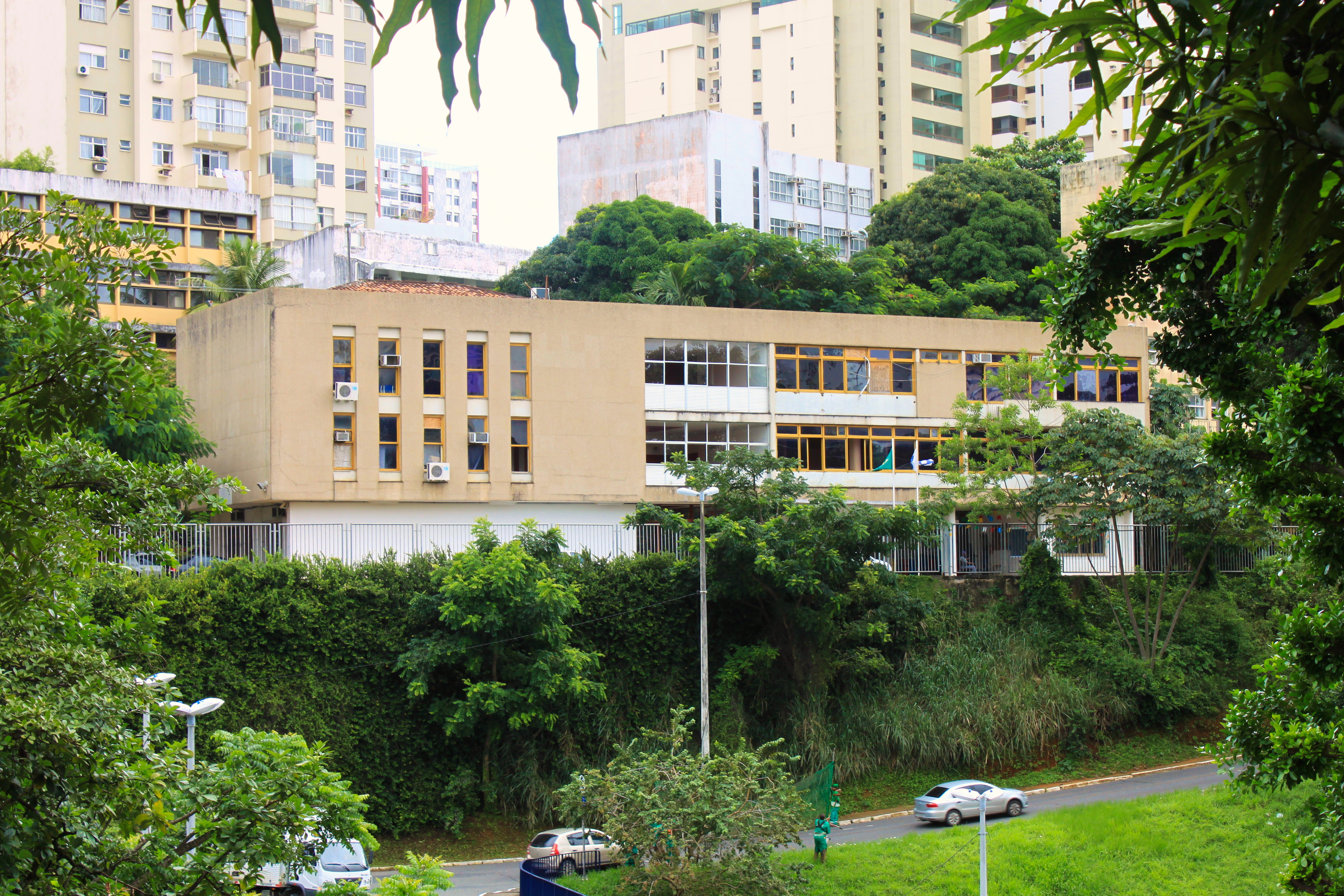 Instituto das Ciências da Informação da Universidade Federal da Bahia, em Salvador, Bahia.